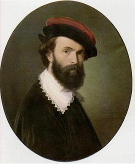 Autoritratto con barba ,olio su tela , di Domenico Caldara del 1858